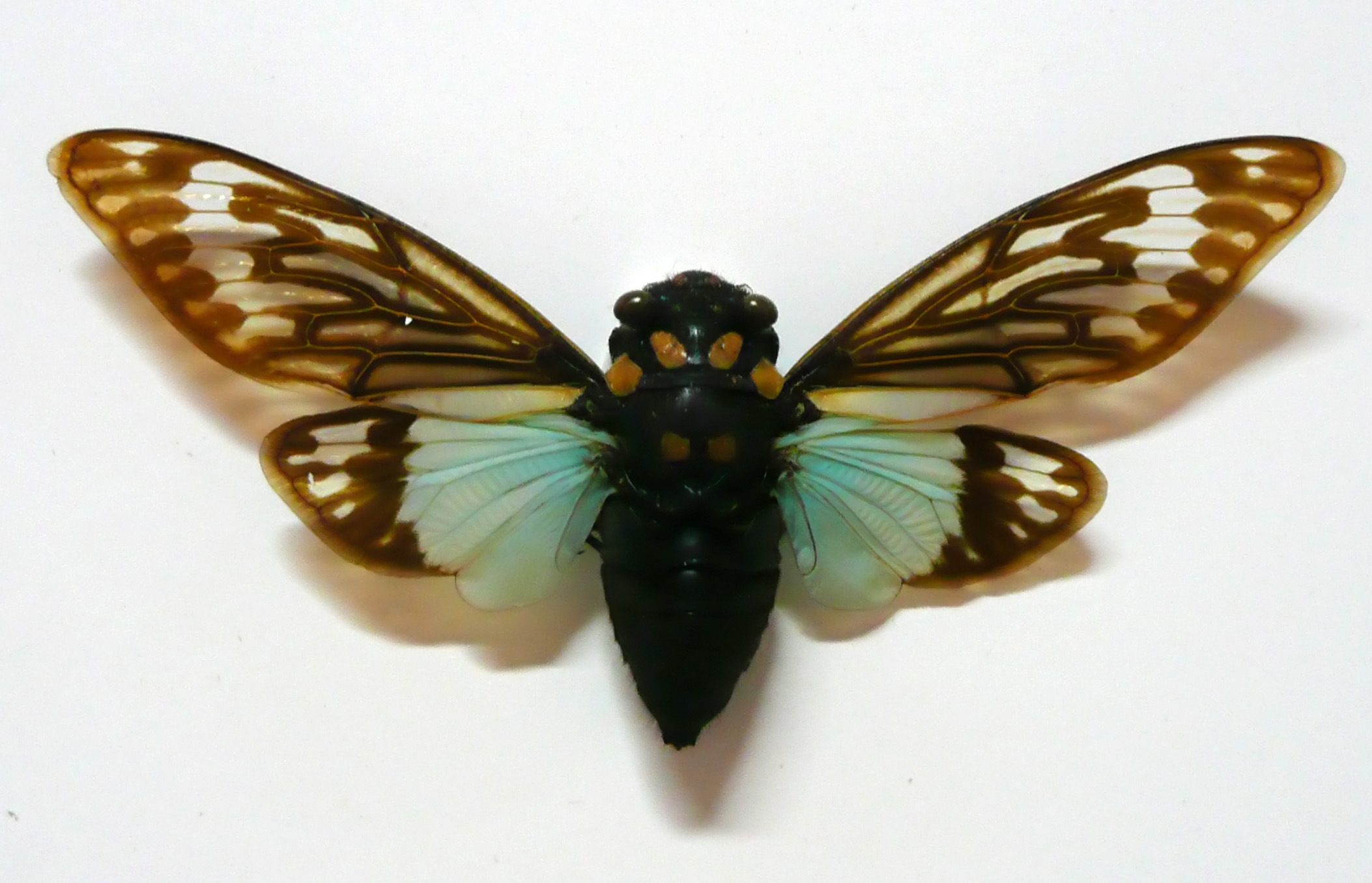 Distantalna splendida (Distant, 1878)